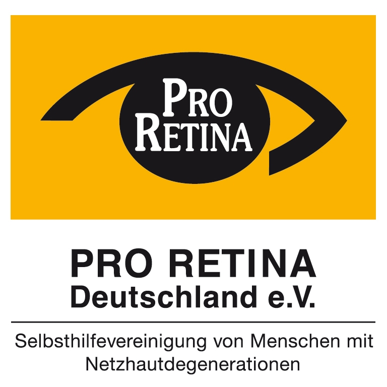 Pro Retina Deutschland - Logo